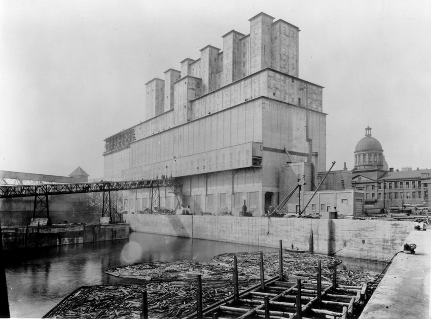 Le gigantesque silo 2 faisant paraître petit le marché Bonsecours, Montréal, 1912